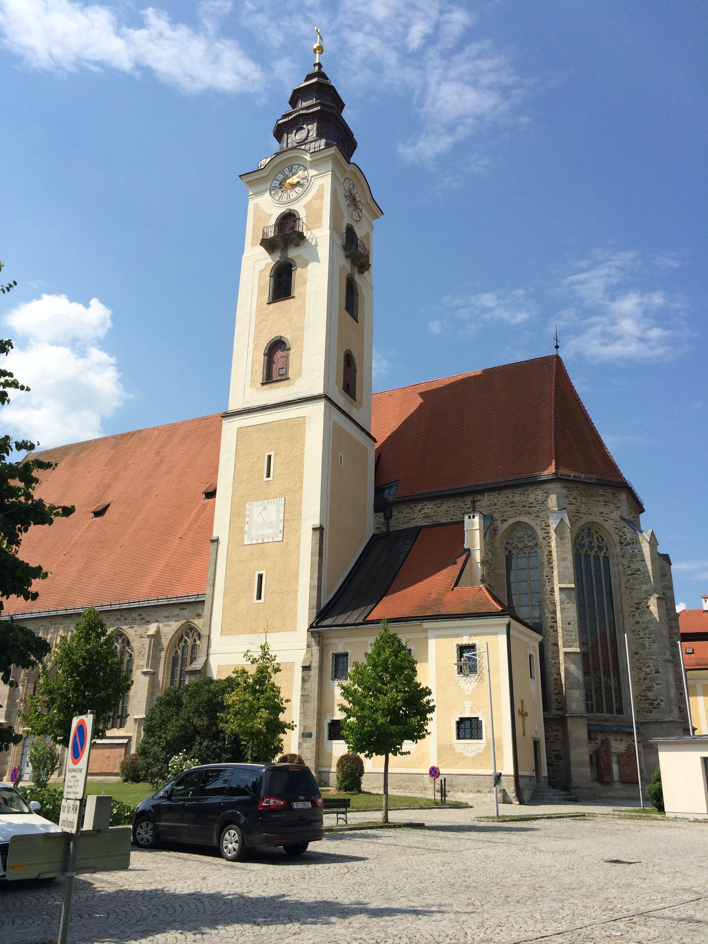 Stadtpfarrkirche Eferding